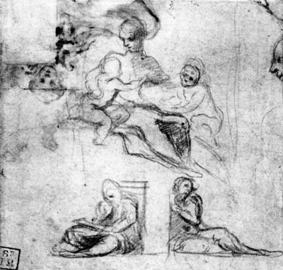 Correggio, preparazione madonna casalmaggiore, british museum